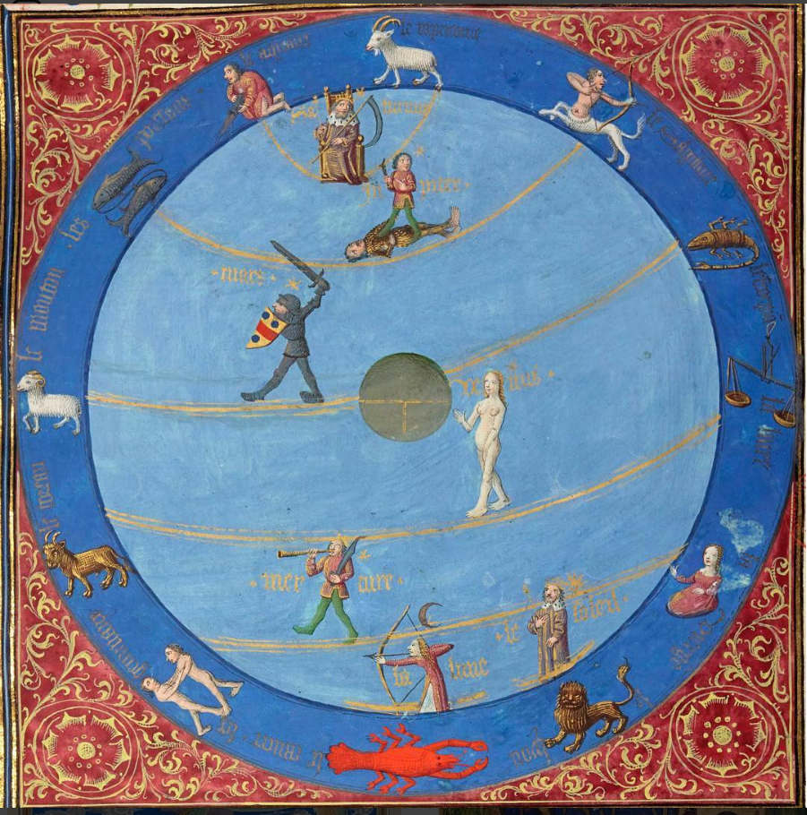 Bartholomeus Anglicus, Livre des propriétés des choses, traduction française de Jean Corbichon BnF, Français 9140, fol. 169r